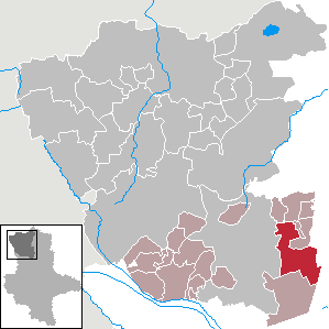 Lage von Jävenitz im Altmarkkreis Salzwedel